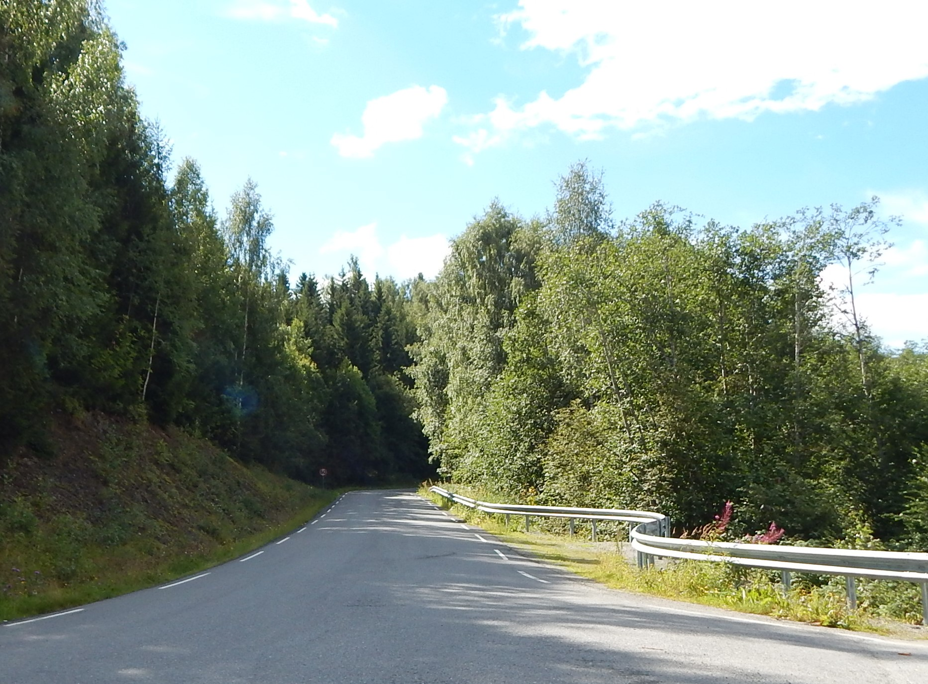 Årvollshøgda (fylkesvei 1708, tidl. 42) sett fra fylkesvei 212